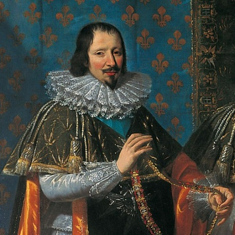 Claude Bouthillier, grand trésorier de l'Ordre du Saint-Esprit, à la réception d'Henri II d'Orléans, duc de Longueville, le 15 mai 1633.